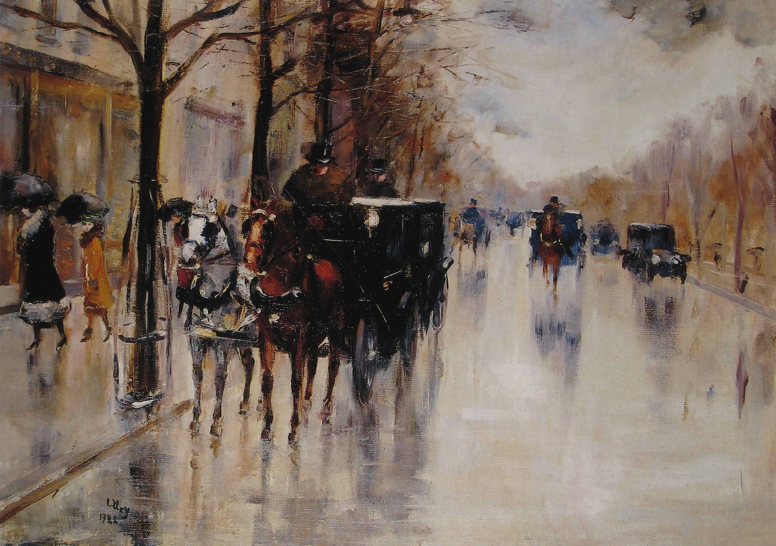 Lesser Ury: Unter den Linden (aus: Lesser Ury, Gebr. Mann Verlag)